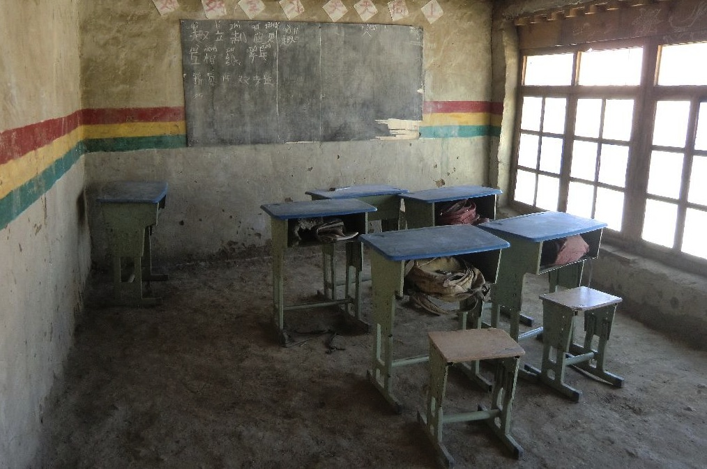 Schule in Zombuk, innen